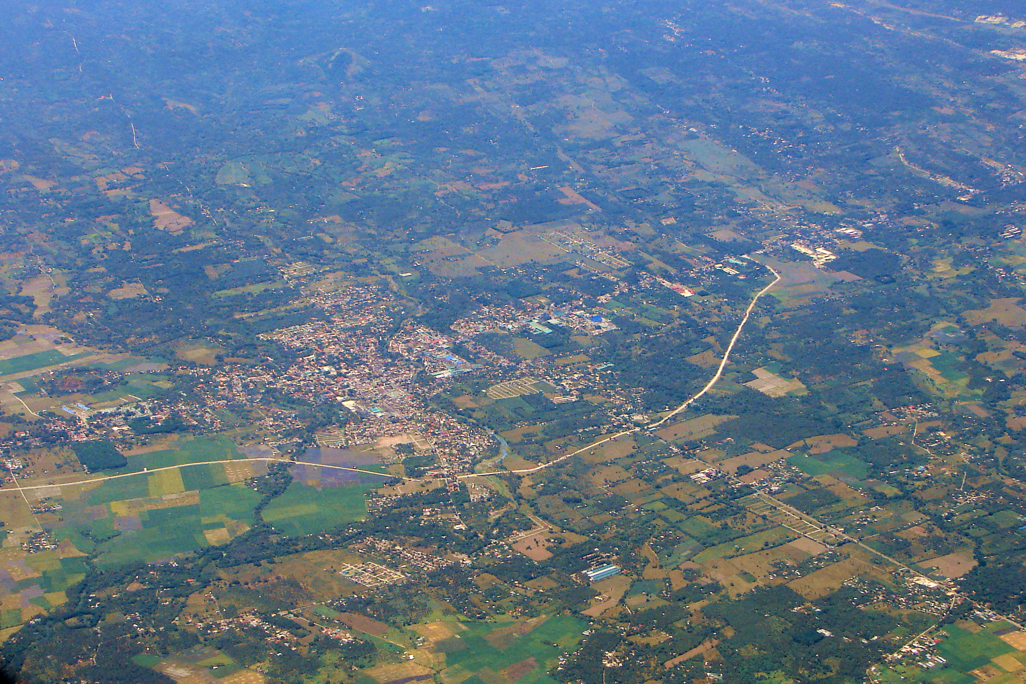 Candelaria, Quezon, Philippines